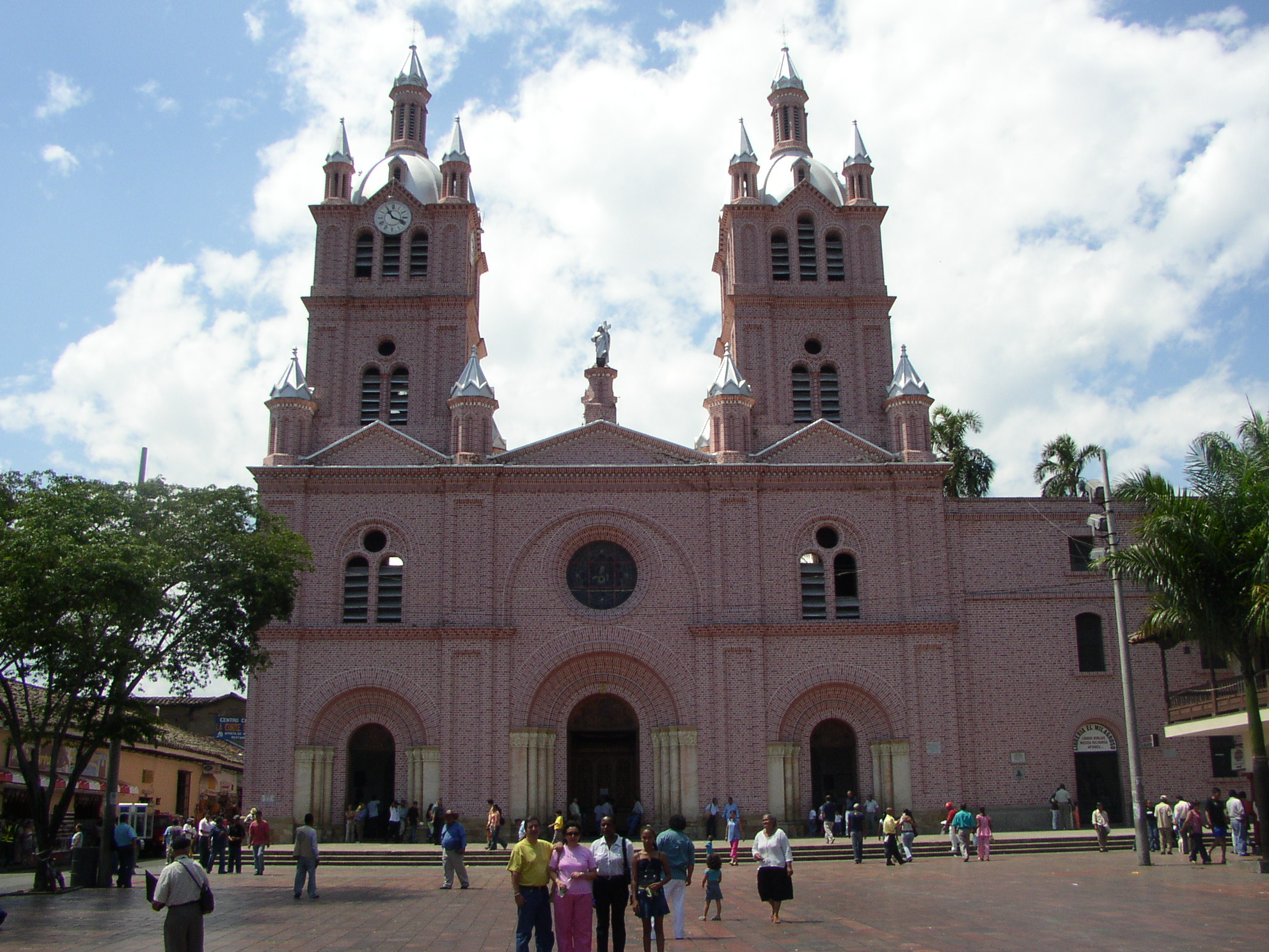 Basilica Buga